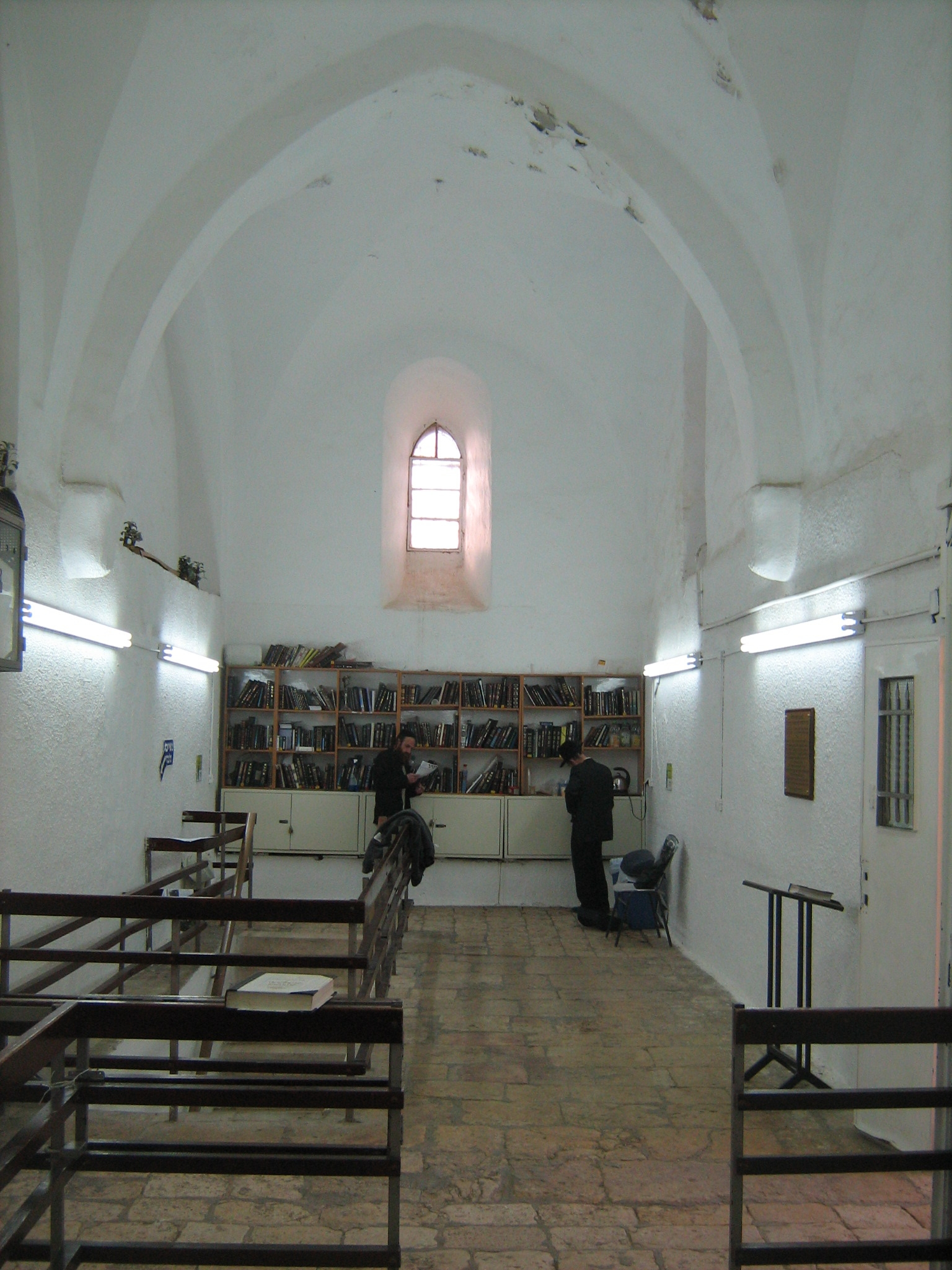 נבי סמואל